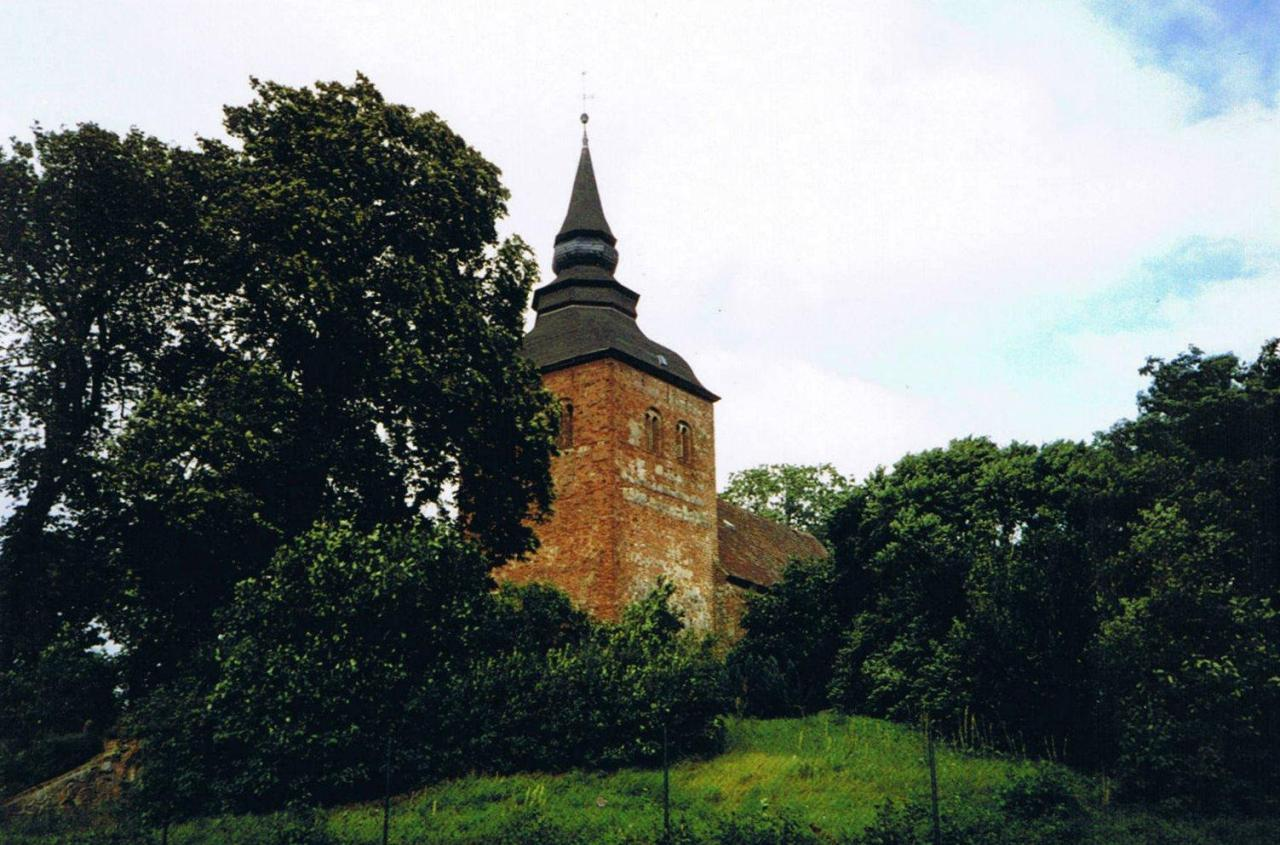 Kirche in Schloen (Landkreis Müritz, Mecklenburg-Vorpommern)